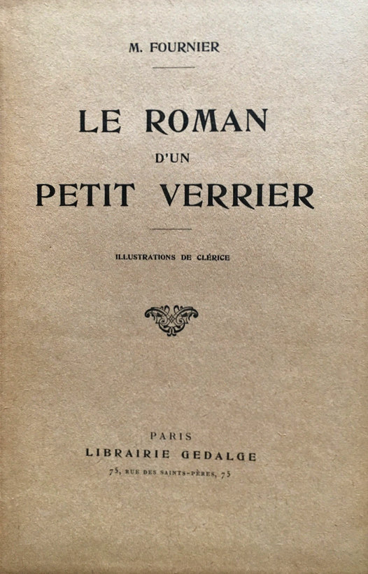 Le roman d'un petit verrier, Mathieu Fournier (1868-1963), 1925.